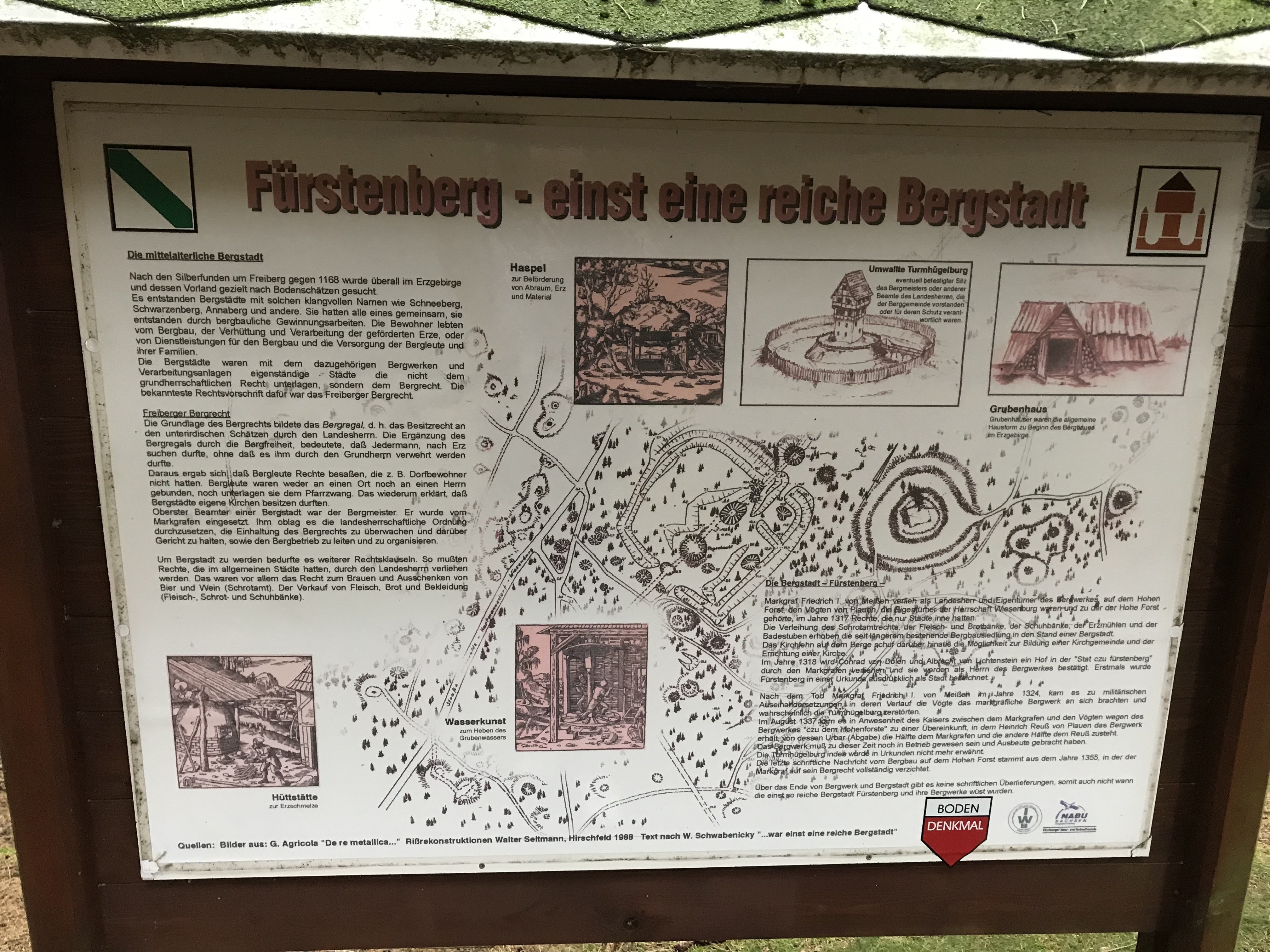 Infotafel Bergbaulehrpfad